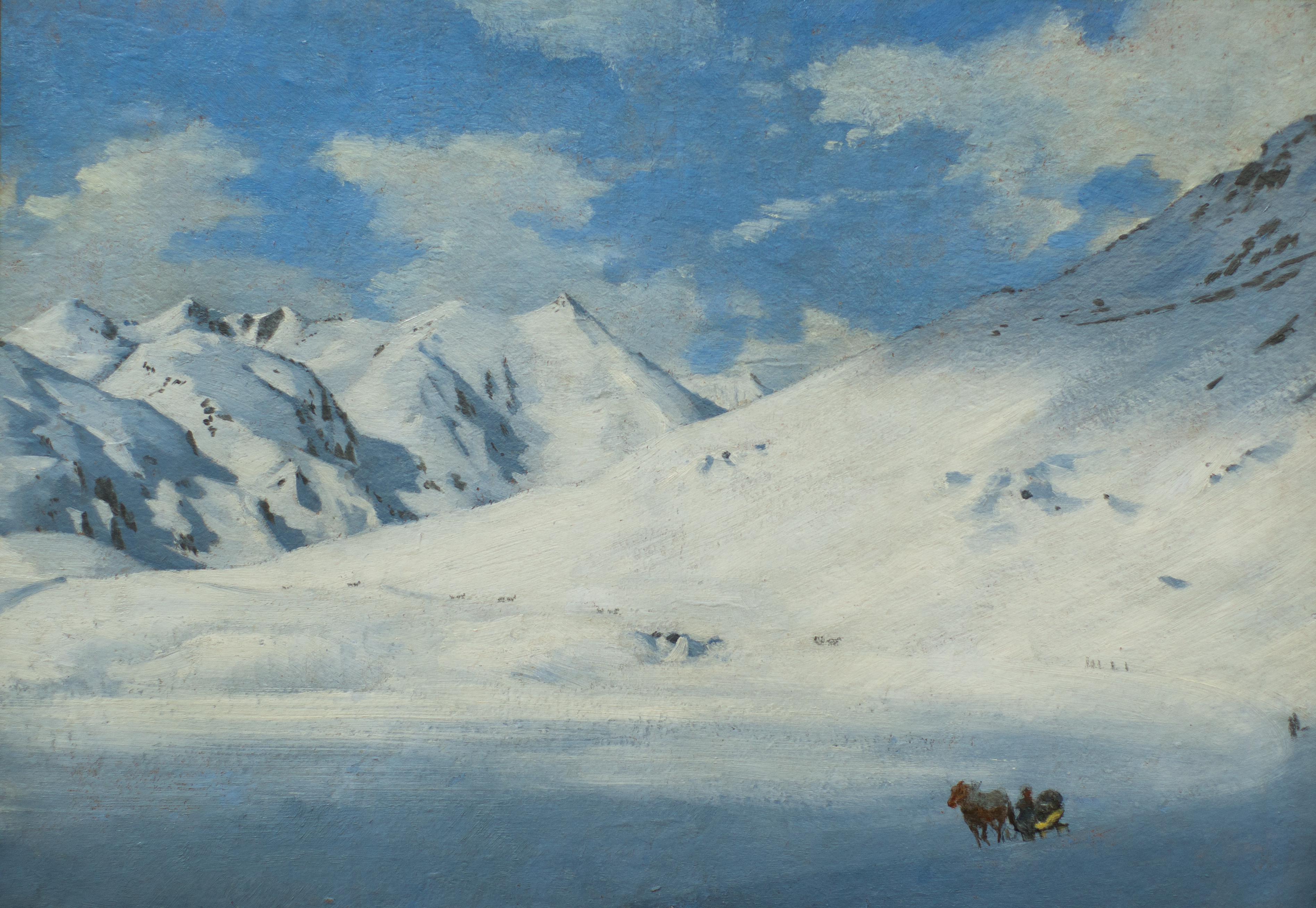 Route du Saint-Gothard en hiver. Huile sur toile marouflée sur bois de Jules Jacod Guillarmod